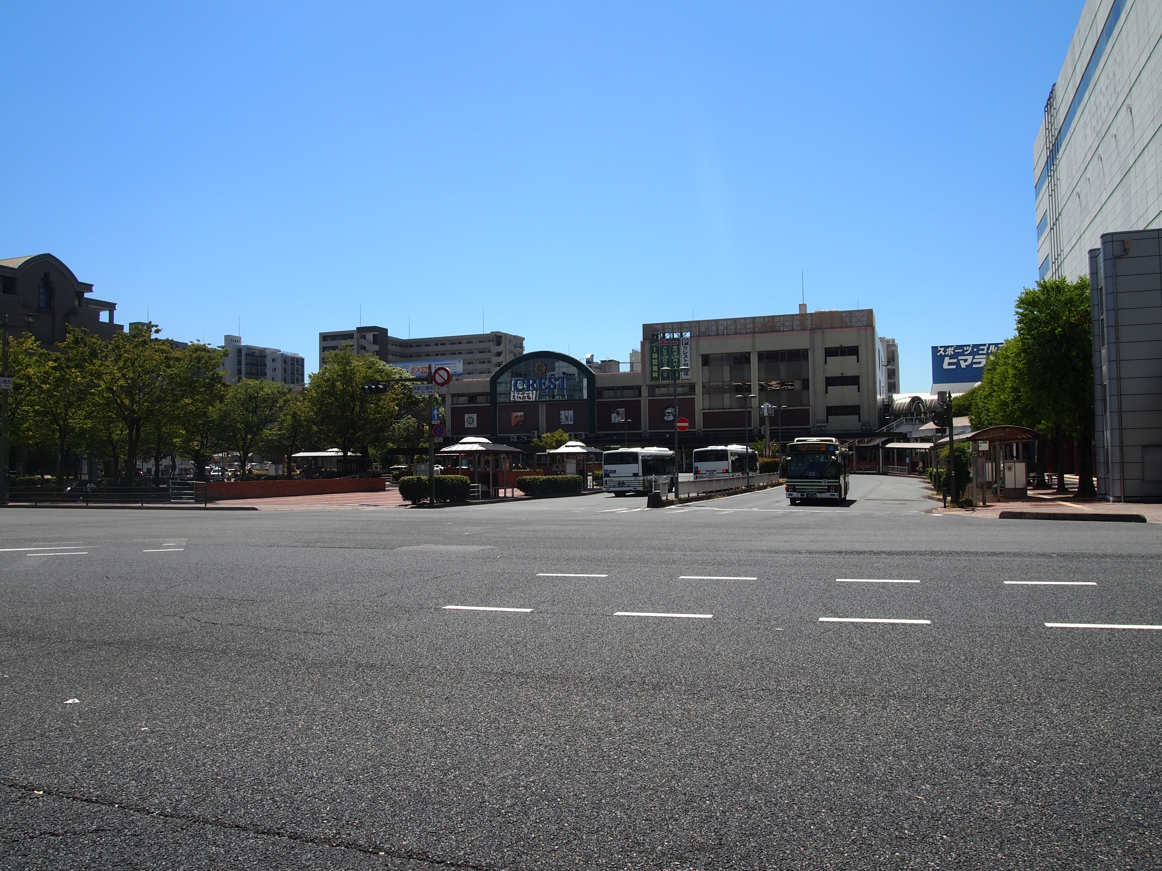 呉駅